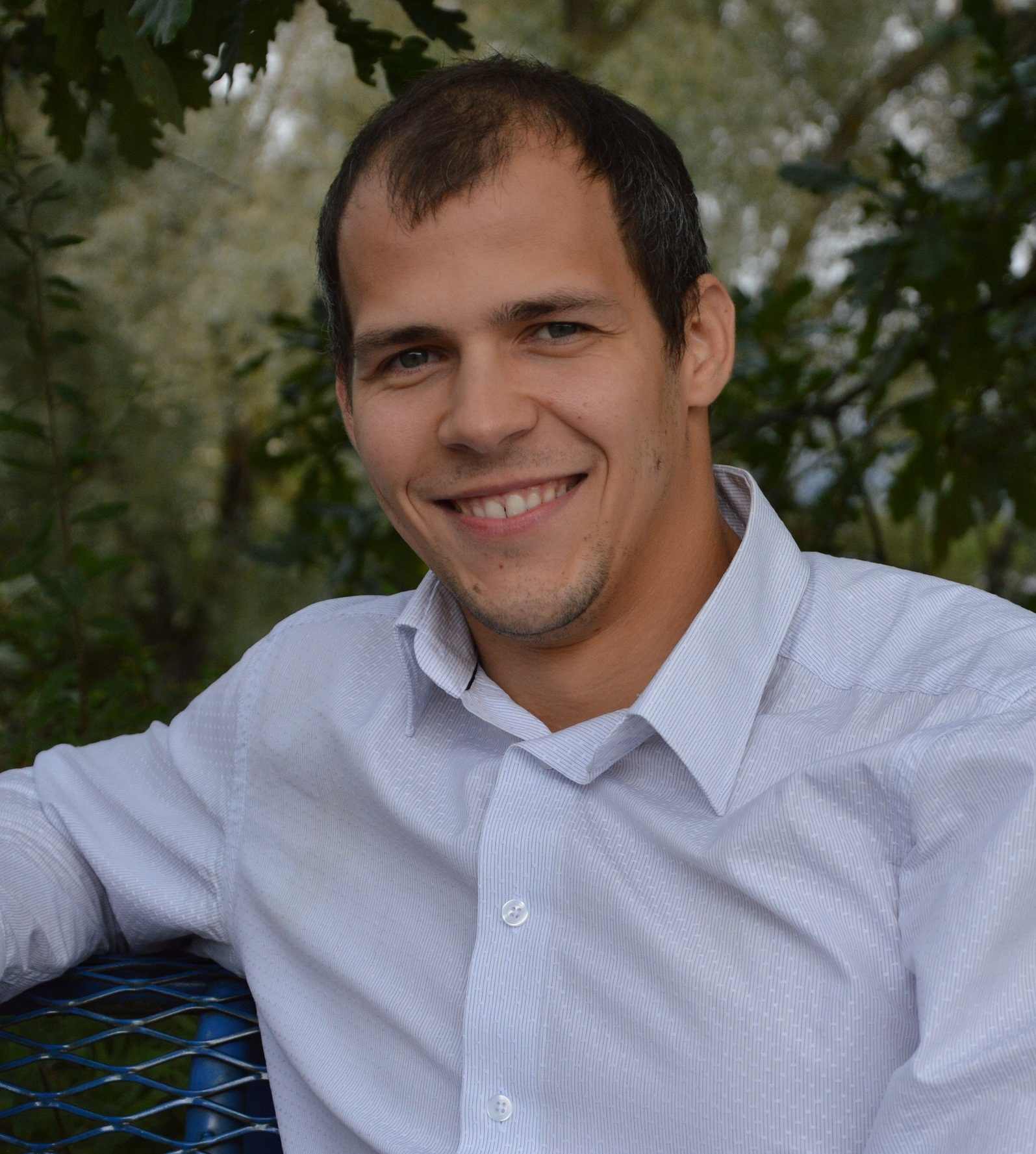 Risto Kask (2013)